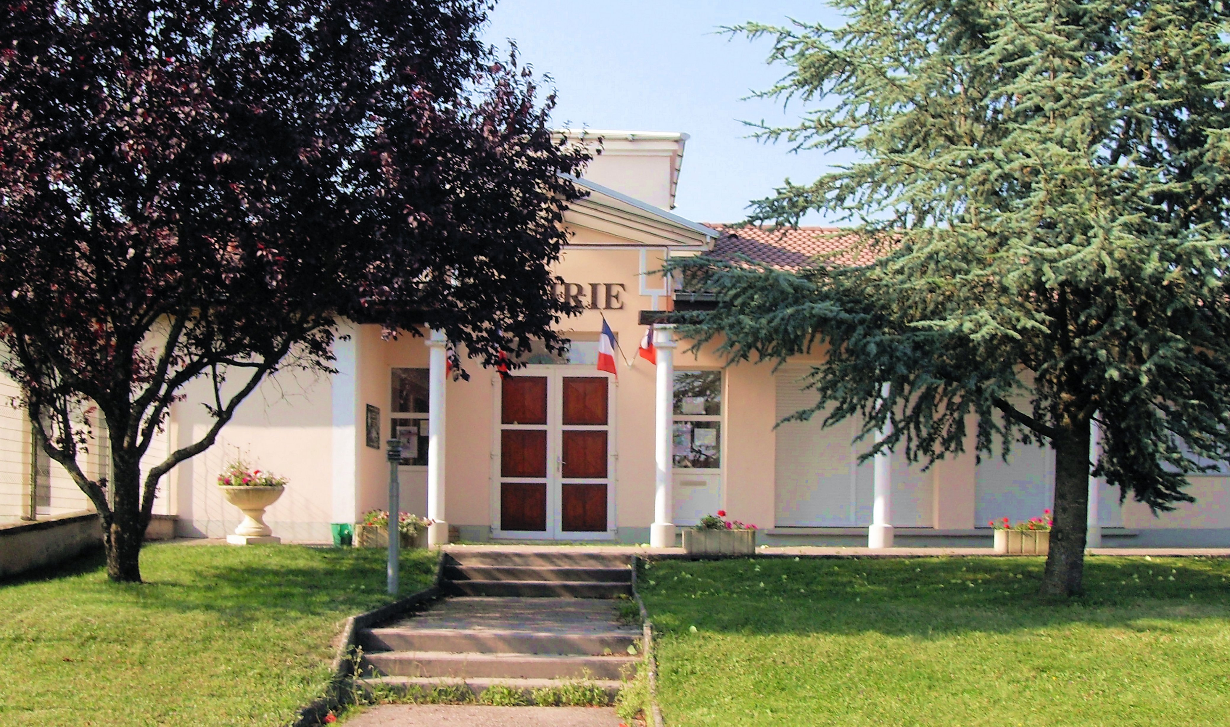 La mairie de Hadigny-les-Verrières